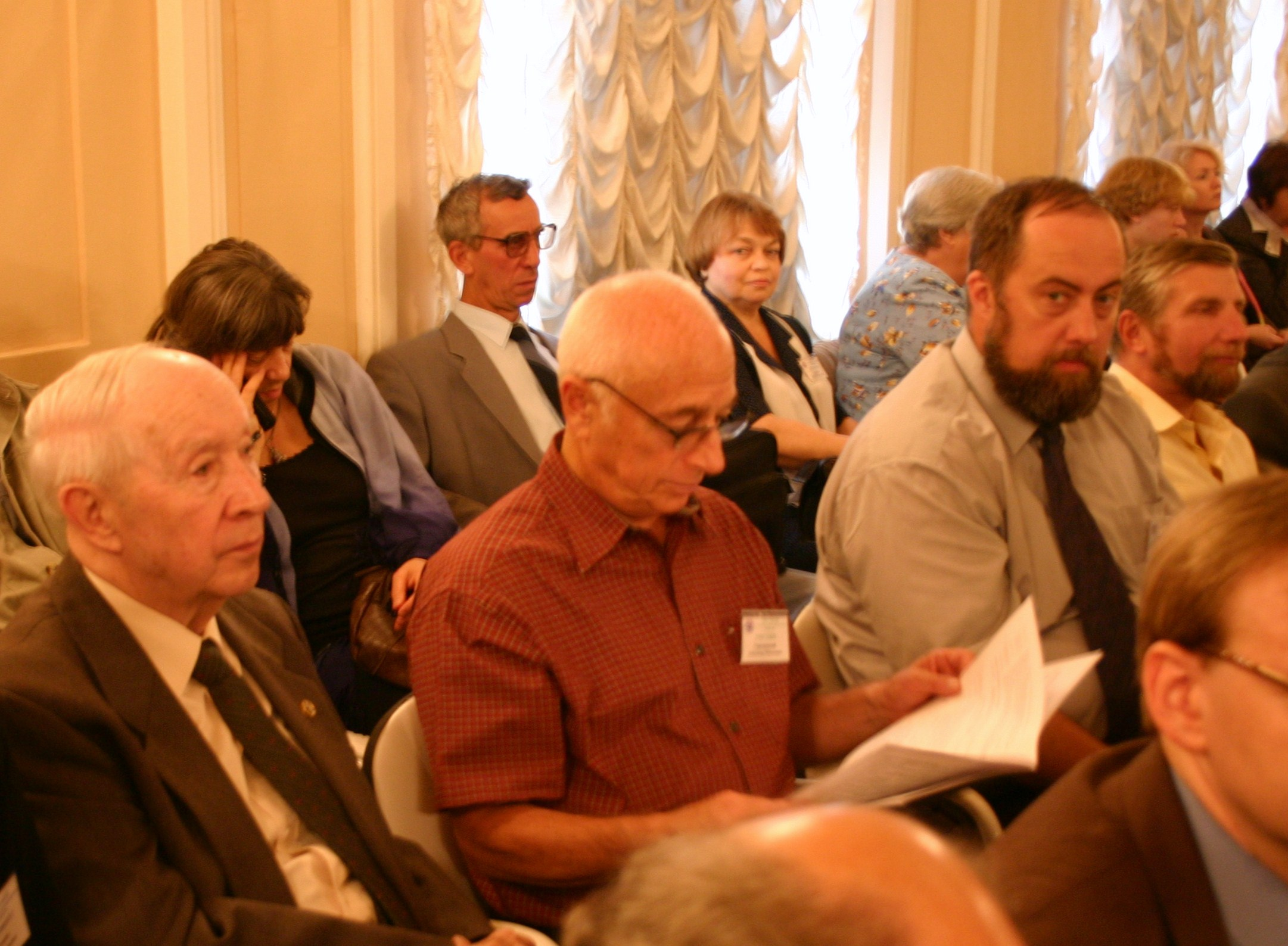 на 12 съезде РГО в Кронштадте. Слена направо сидят член-корр. РАН Александр Иванович Сорокин, д. г.-м. наук Александр Моисеевич Городницкий, к.г.н. Леонид Григорьевич Колотило, д.и.н. Валентин Георгиевич Смирнов